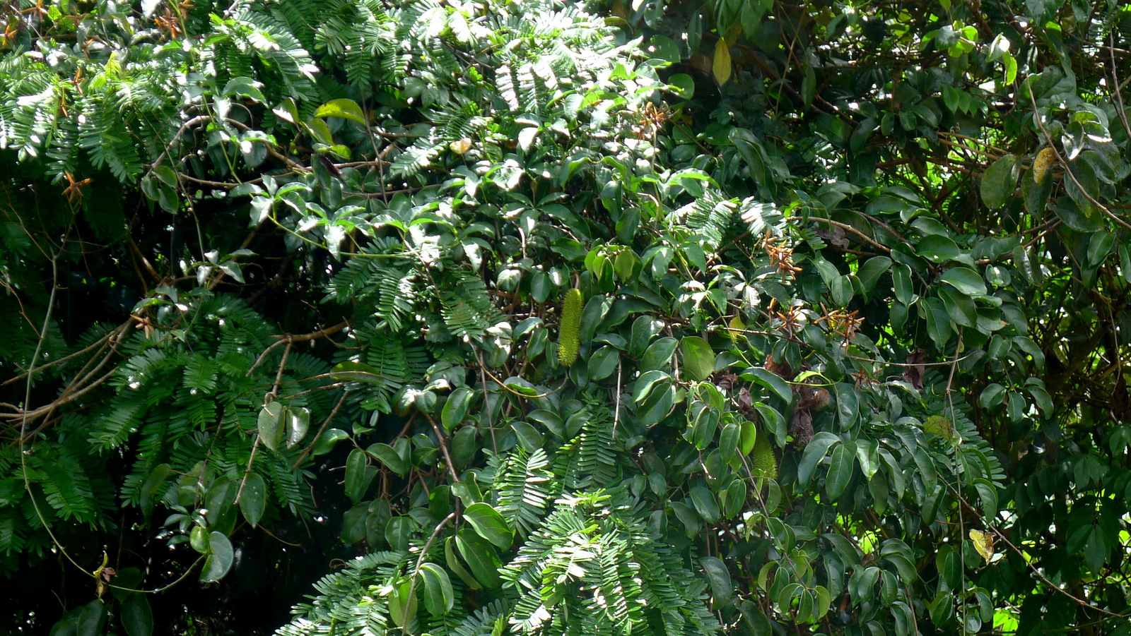 Bignonia sciuripabula (Bureau & K.Schum.) L.G. Lohmann